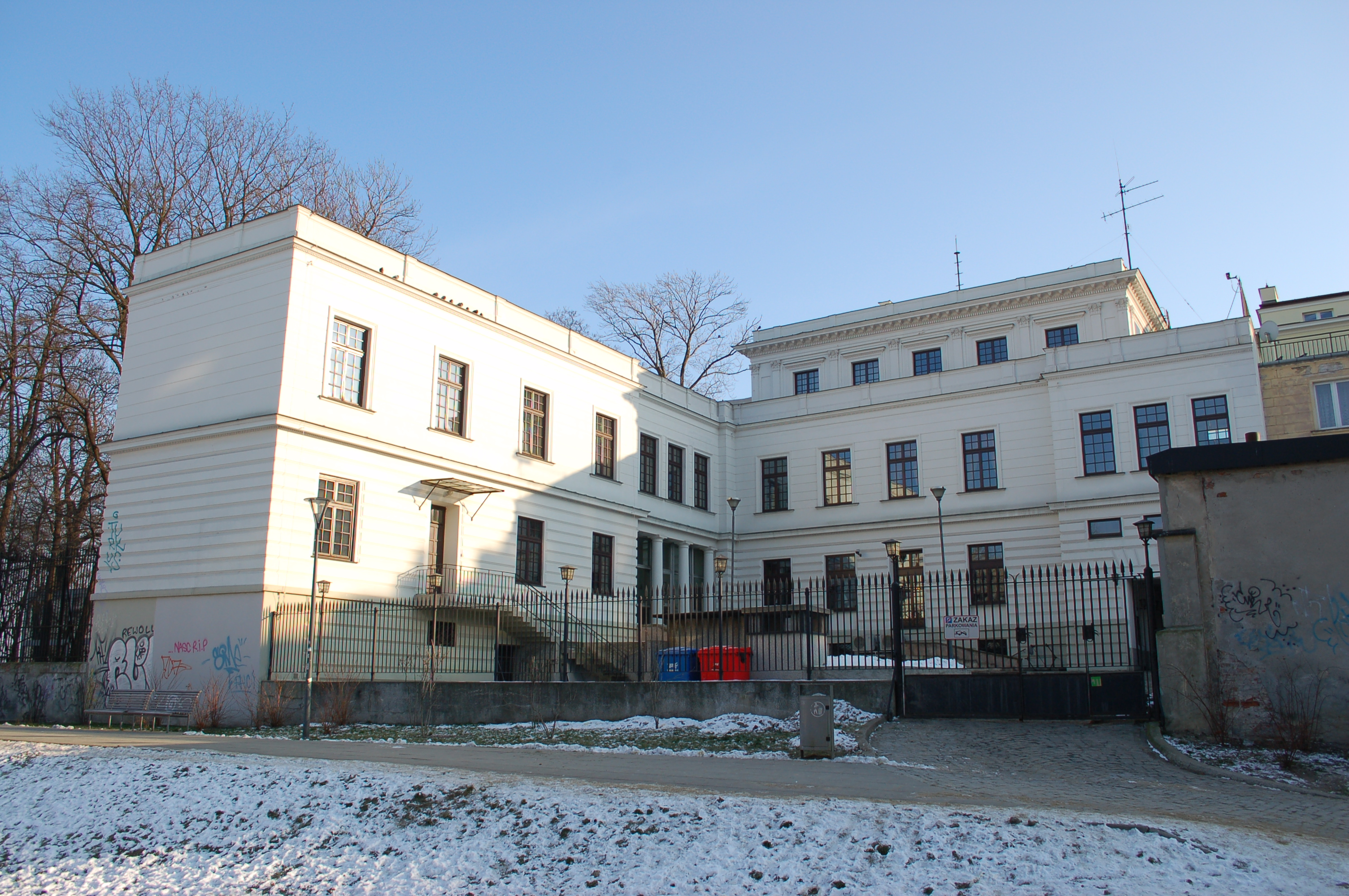 Foksal 6, Warsaw: Przeździecki palace